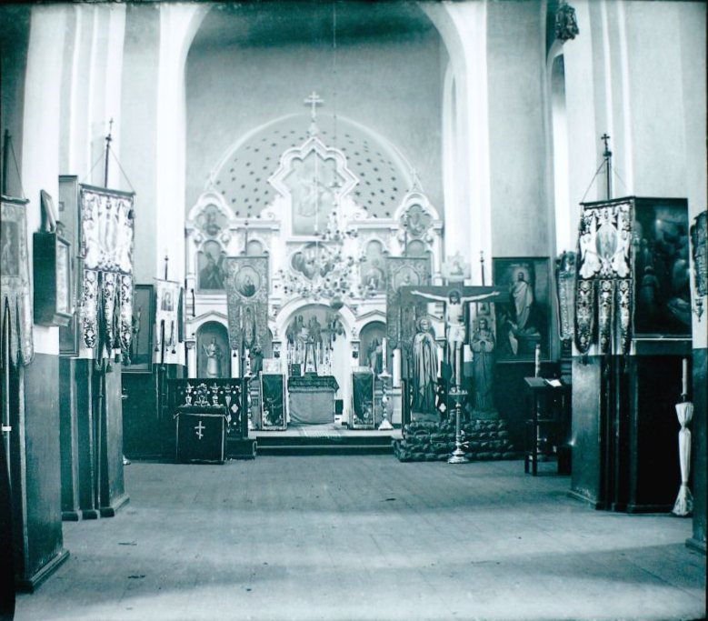 Беларуская (тарашкевіца): Куранец (Kuraniec). Царква-мураўёўка